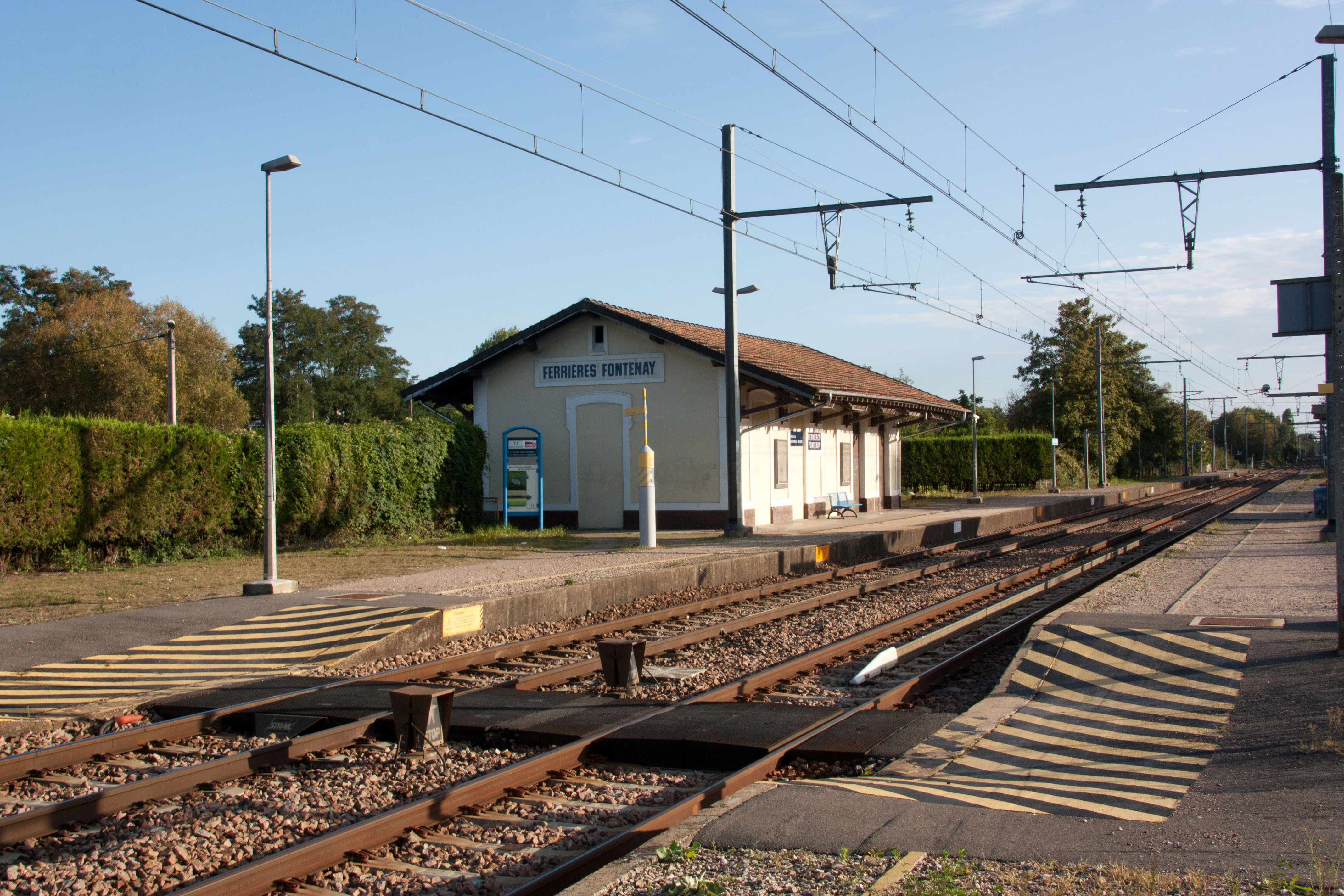 Gare de Ferrières - Fontenay, Fontenay-sur-Loing, Loiret, France.